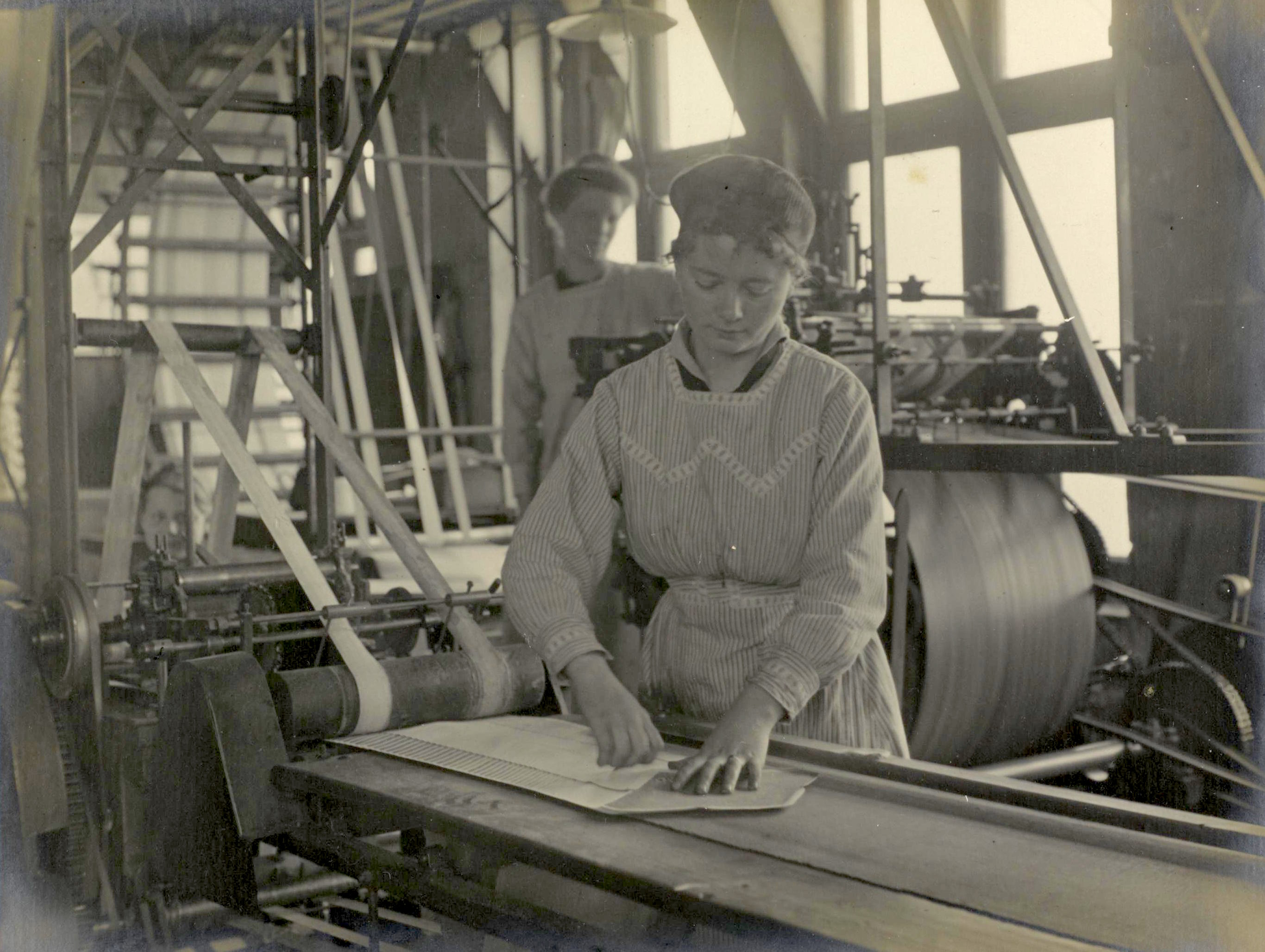 Collectie / Archief : Fotocollectie Arbeidsinspectie Reportage / Serie : Enveloppenfabriek Bontamps te Venlo Beschrijving : 1. Meisje legt ongevouwen enveloppen op de roterende toevoerband van de automatische gommachine (80.000 tot 100.000 per dag). Let op de gelijke afstanden. Leertijd 2 à 3 maanden Datum : 1919 Locatie : Limburg, Venlo Trefwoorden : enveloppen, fabrieken Fotograaf : Filarski, Jan Daniel / Arbeidsinspectie Auteursrechthebbende : Nationaal Archief Materiaalsoort : Negatief (zwart/wit) Nummer archiefinventaris : bekijk toegang 2.24.03 Inventarisnummer : 2255 Bestanddeelnummer : 256-1268